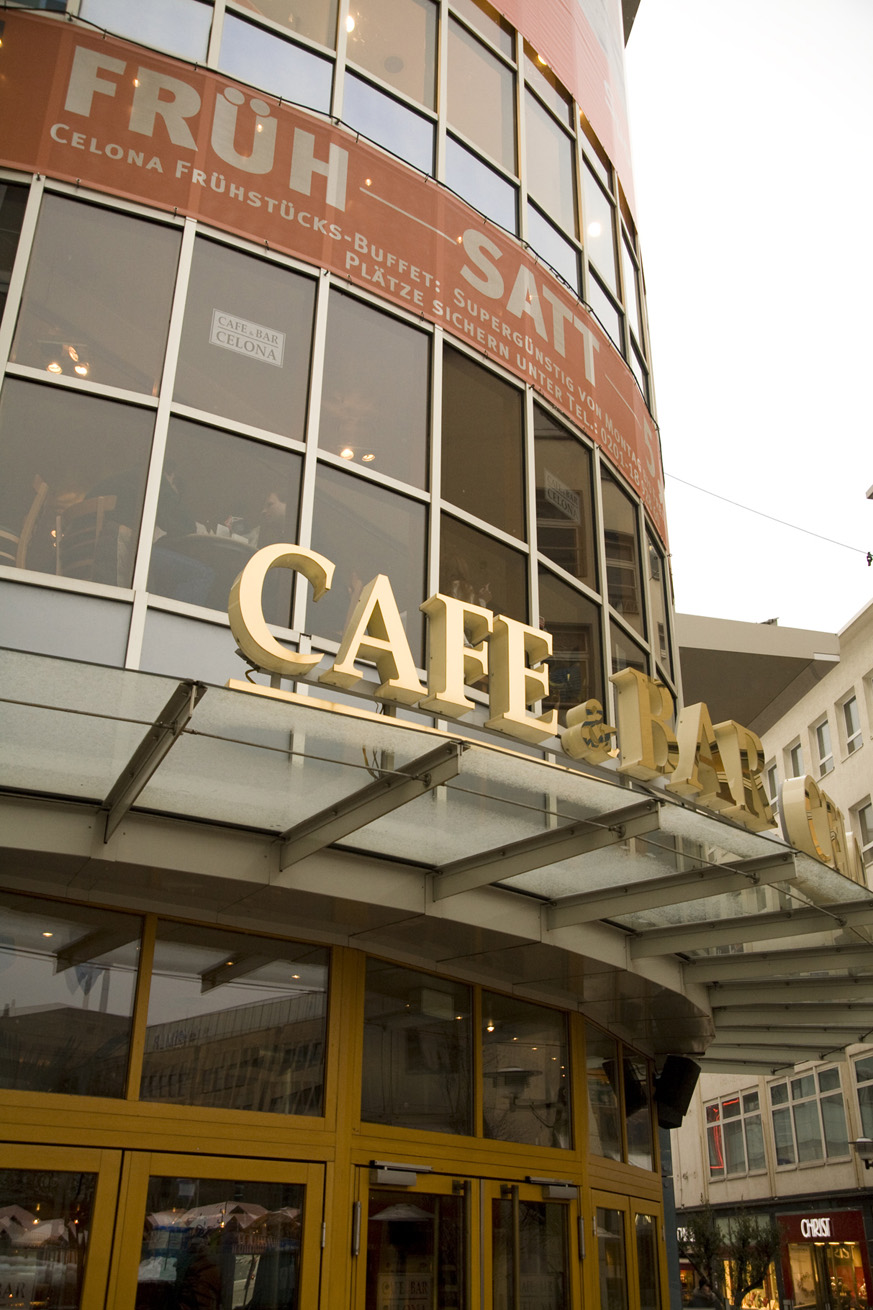 Aussenansicht Cafe & Bar Celona Essen